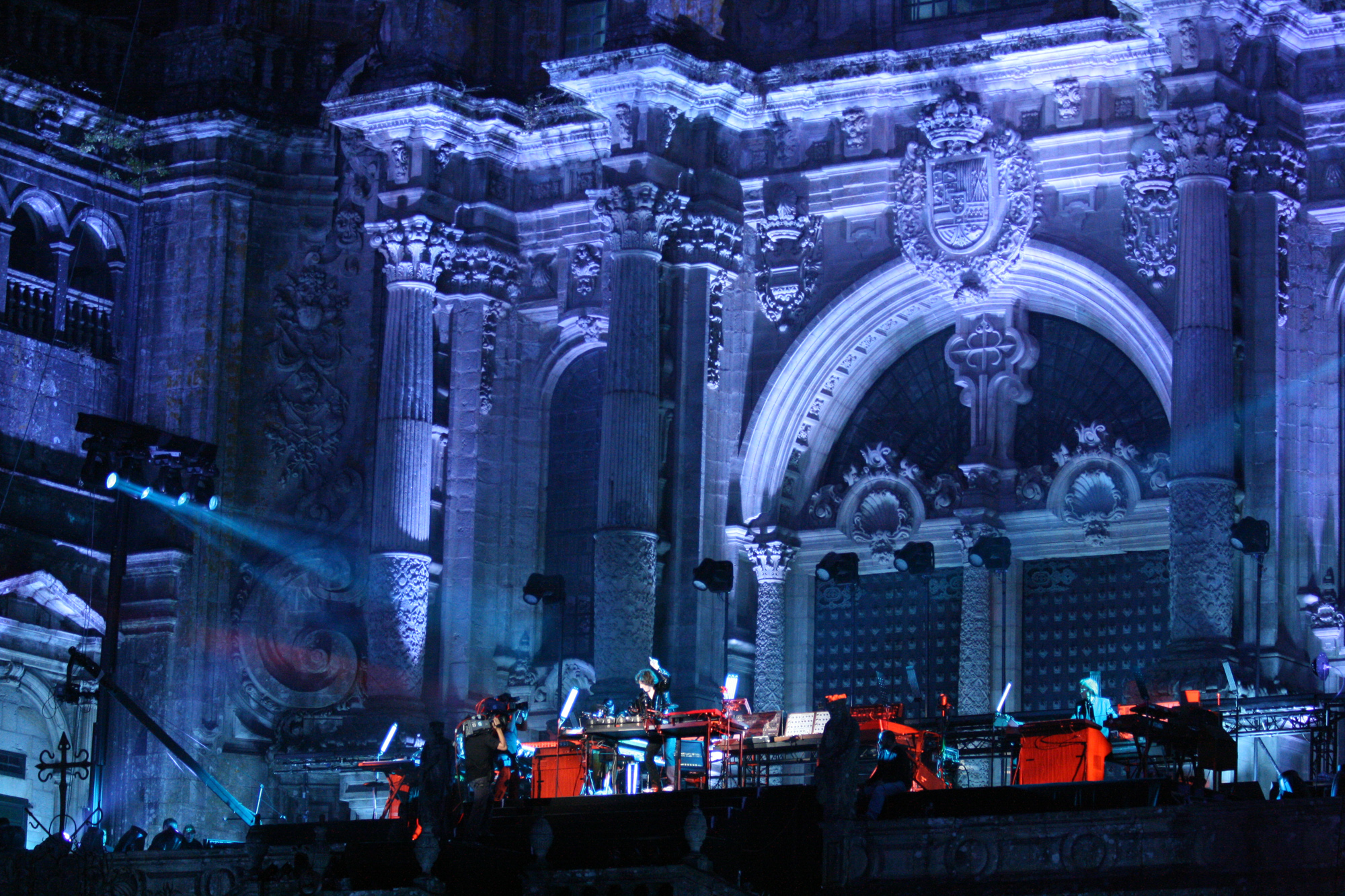 Concierto de Jean Michel Jarre en Santiago de Compostela (Galicia, España) el 31 de julio de 2010. Concert of Jean Michel Jarre Concert of Jean Michel Jarre in Santiago de Compostela (Galicia, Spain) on July 31th of 2010.